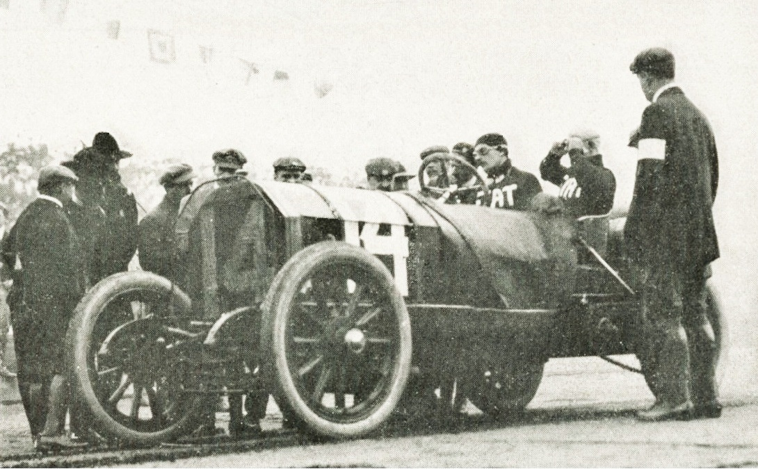 Louis Wagner, au départ du Grand Prix d'Amérique 1908 - La vie au Grand Air du 12 décembre 1908, p.424